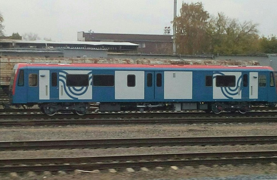 Служебный дизельный вагон метро «Ока» с двумя кабинами управления при перегонке